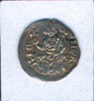 IV. Béla magyar király dénárja